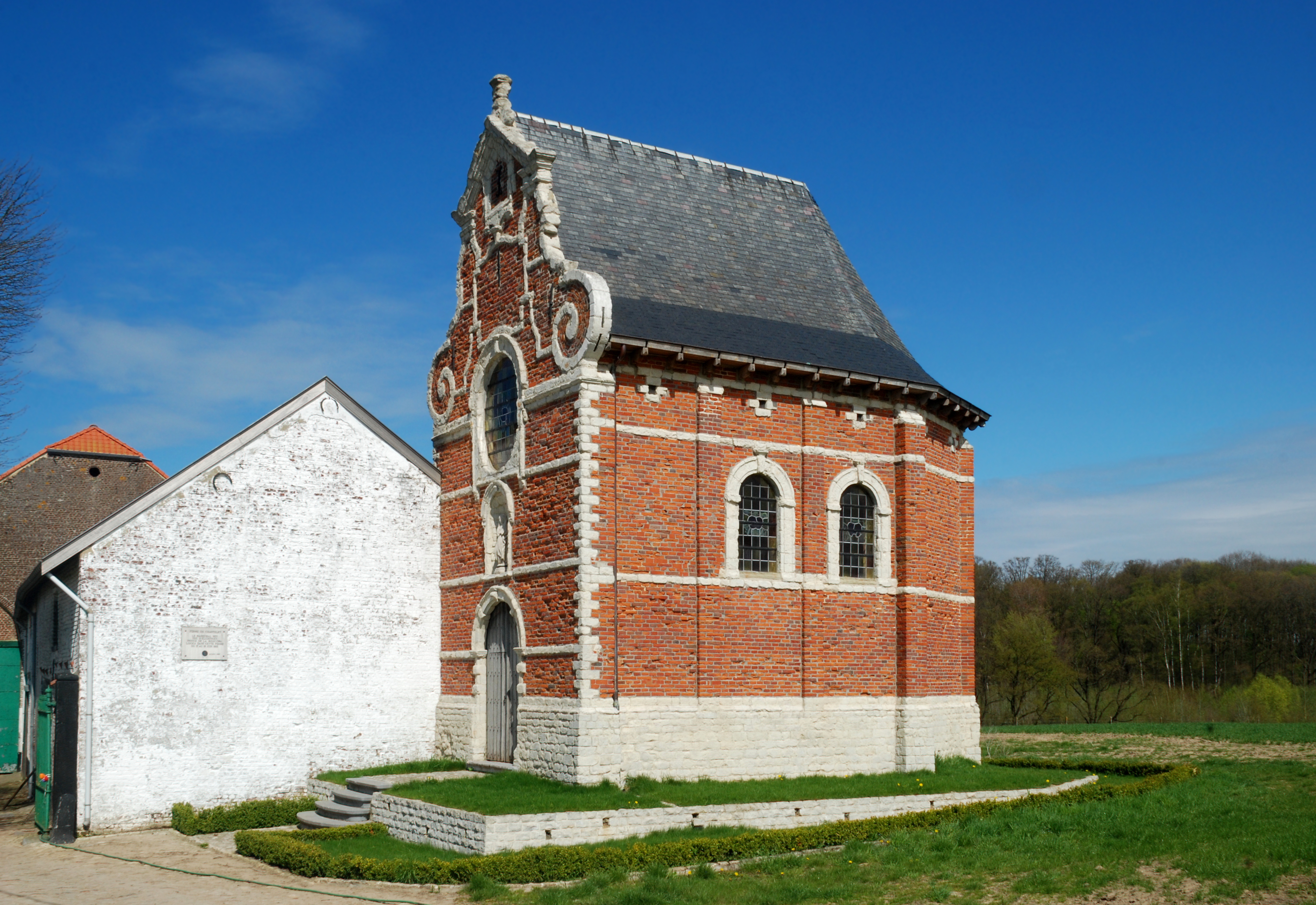 Belgique - Brabant wallon - Genappe - Chapelle du Chantelet